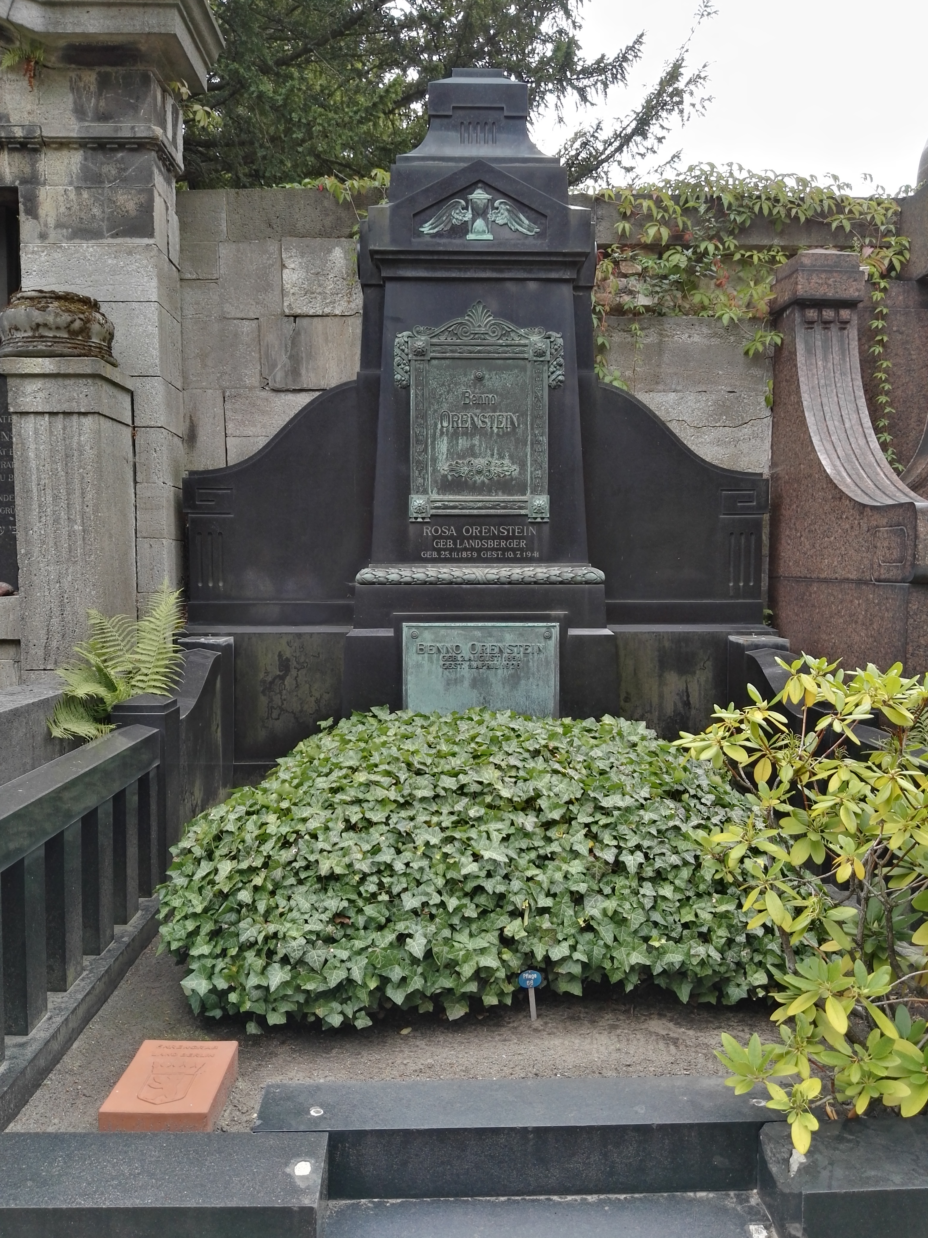 Grab von Benno Orenstein auf dem denkmalgeschützten Jüdischen Friedhof Berlin-Weißensee